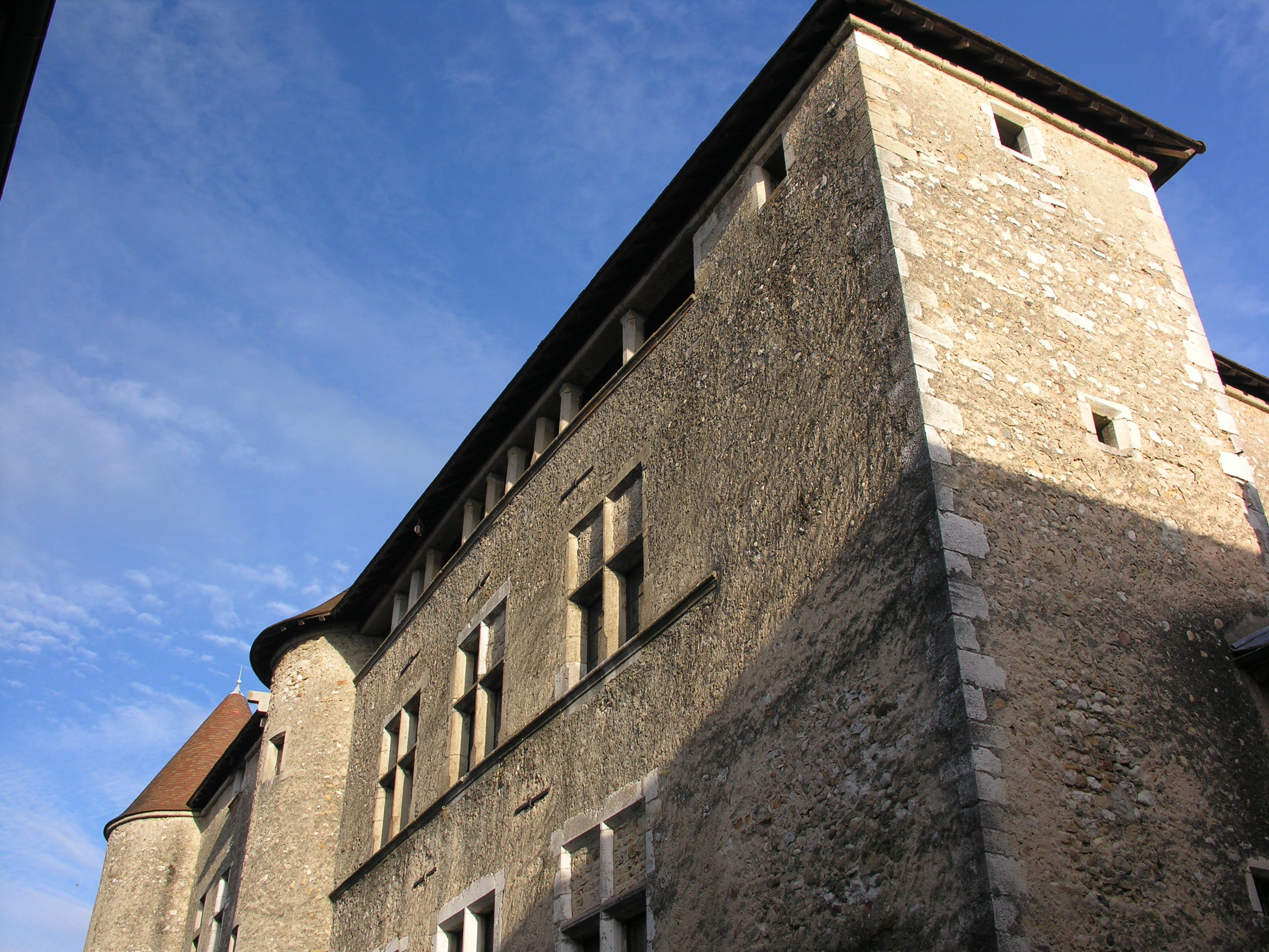 Partie ouest du Château de Sainte-Julie